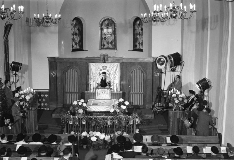 22.4.1959 West-Berlin, Kreuzberg, Einweihung der Synagoge am Fraenkel-Ufer, ältester deutscher Rabbiner Dr. Kahana